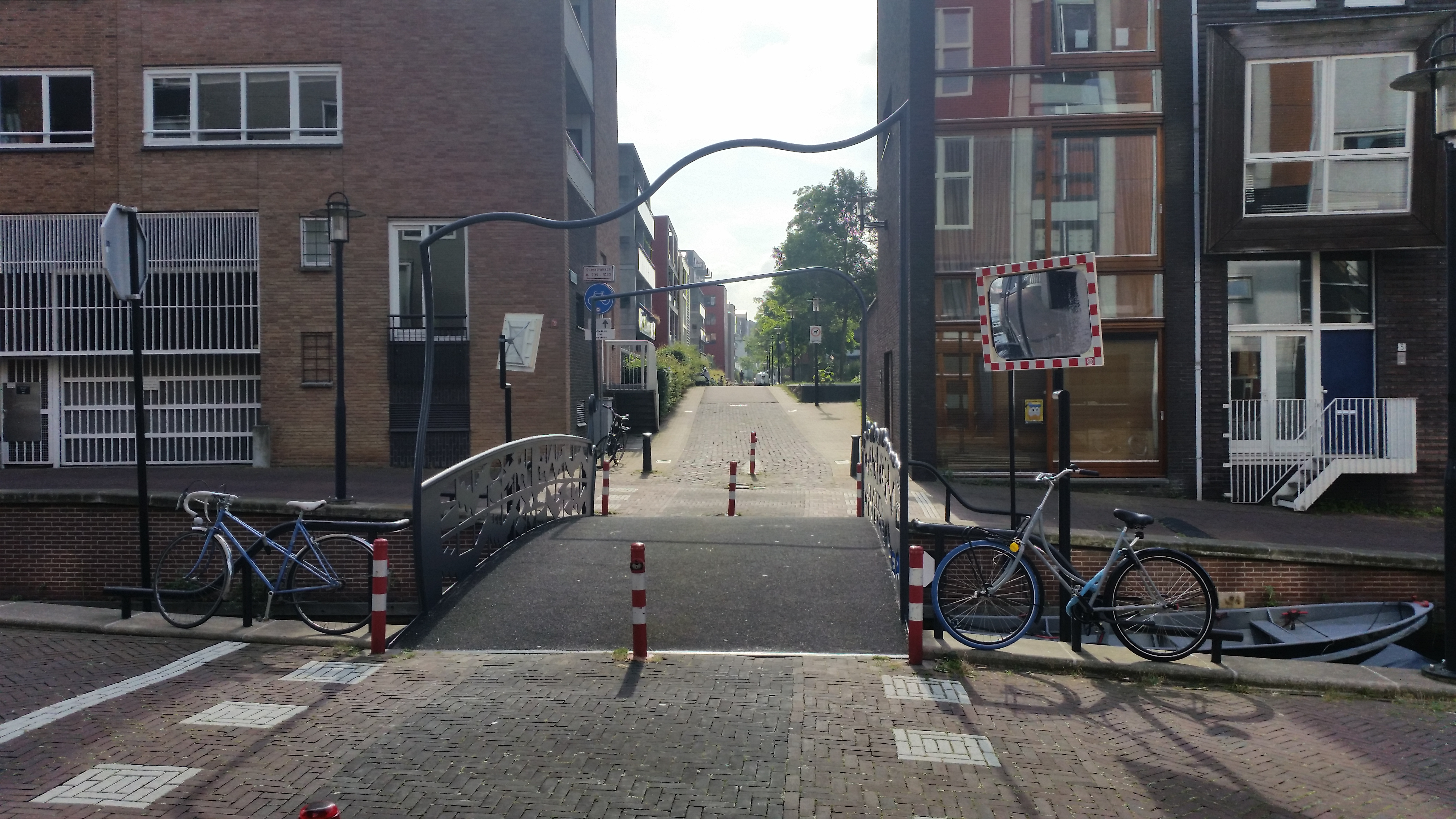 Overzicht richting oosten van Brug 1991, Society